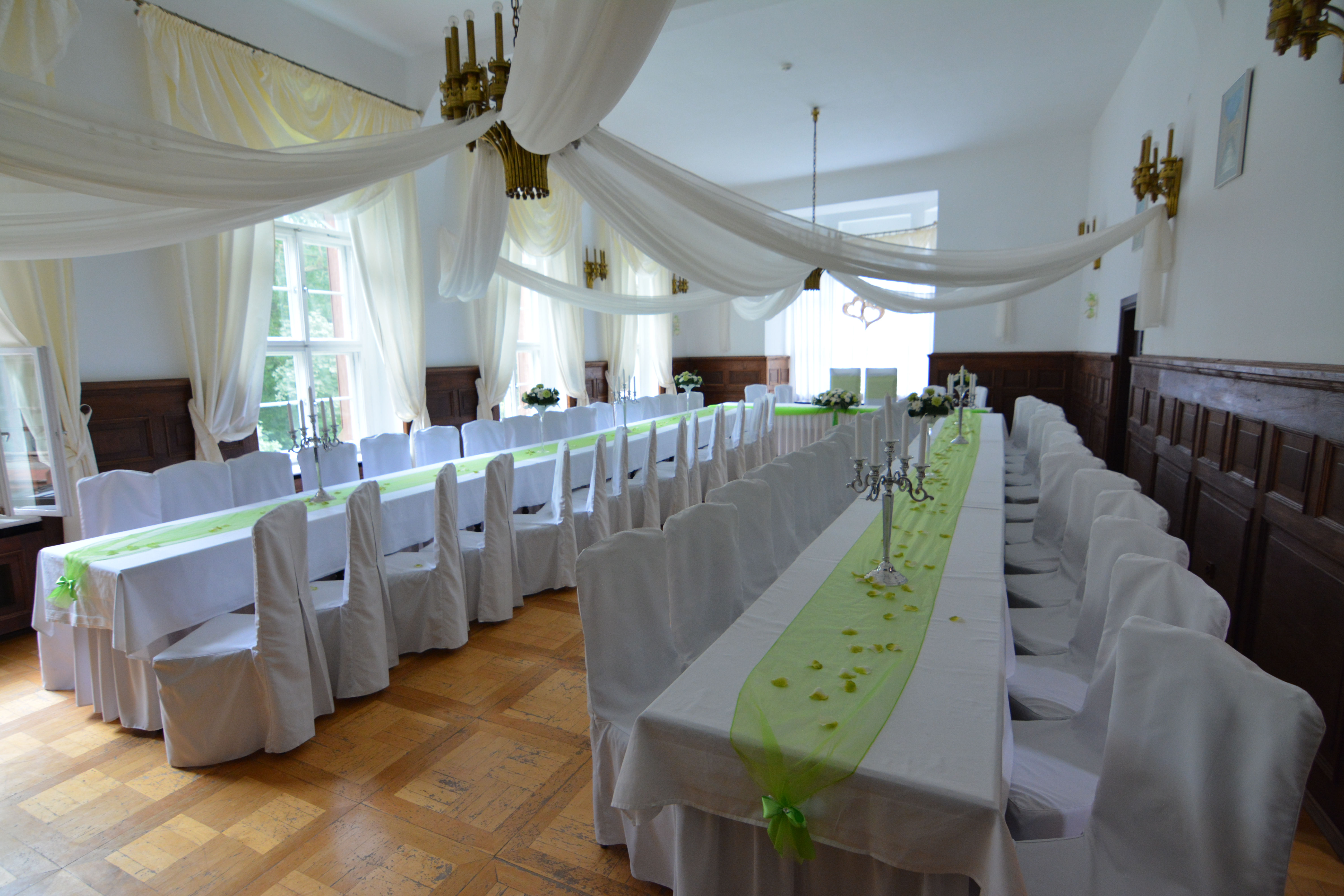 Pęzino - zamek, XIV, 1 poł. XVI, 1600, XIX